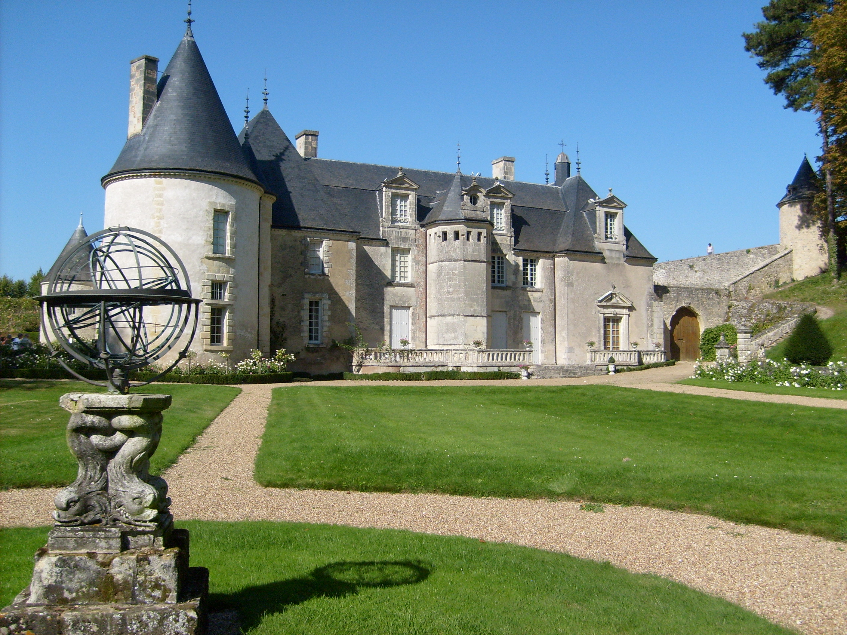 Façade du château de la Chatonnière